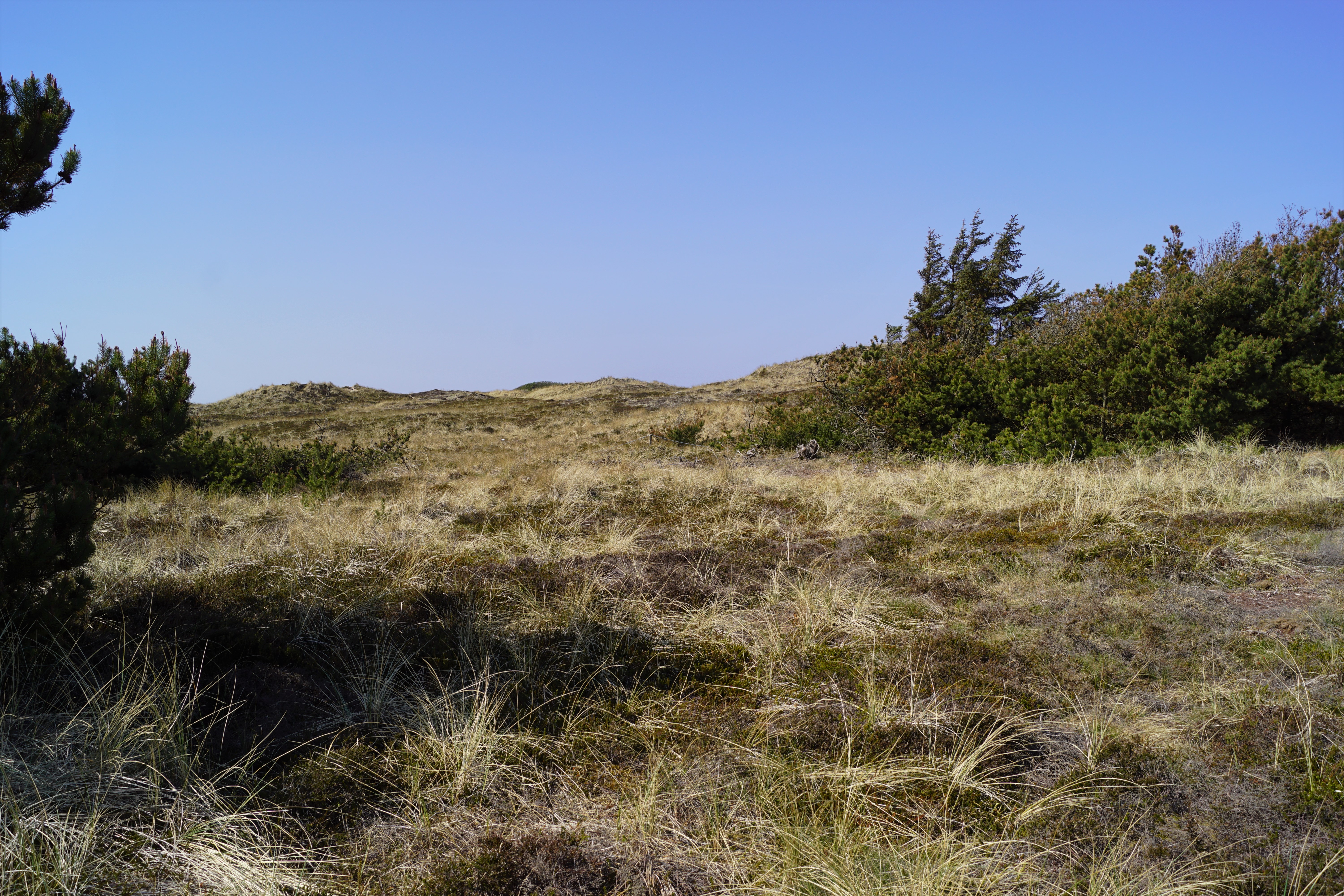 Vangså Hede i Thy